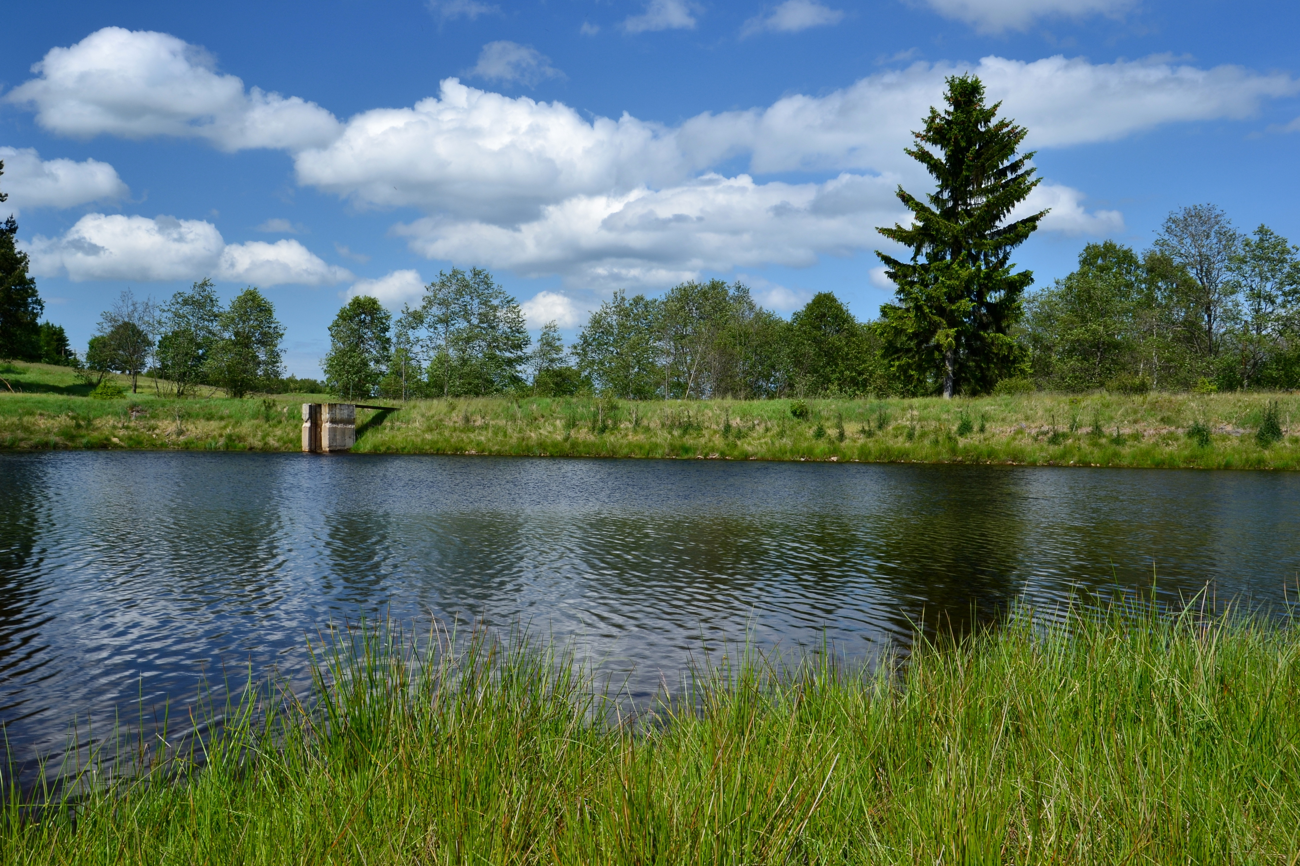 Načetínský rybník jihozápadně od Načetína